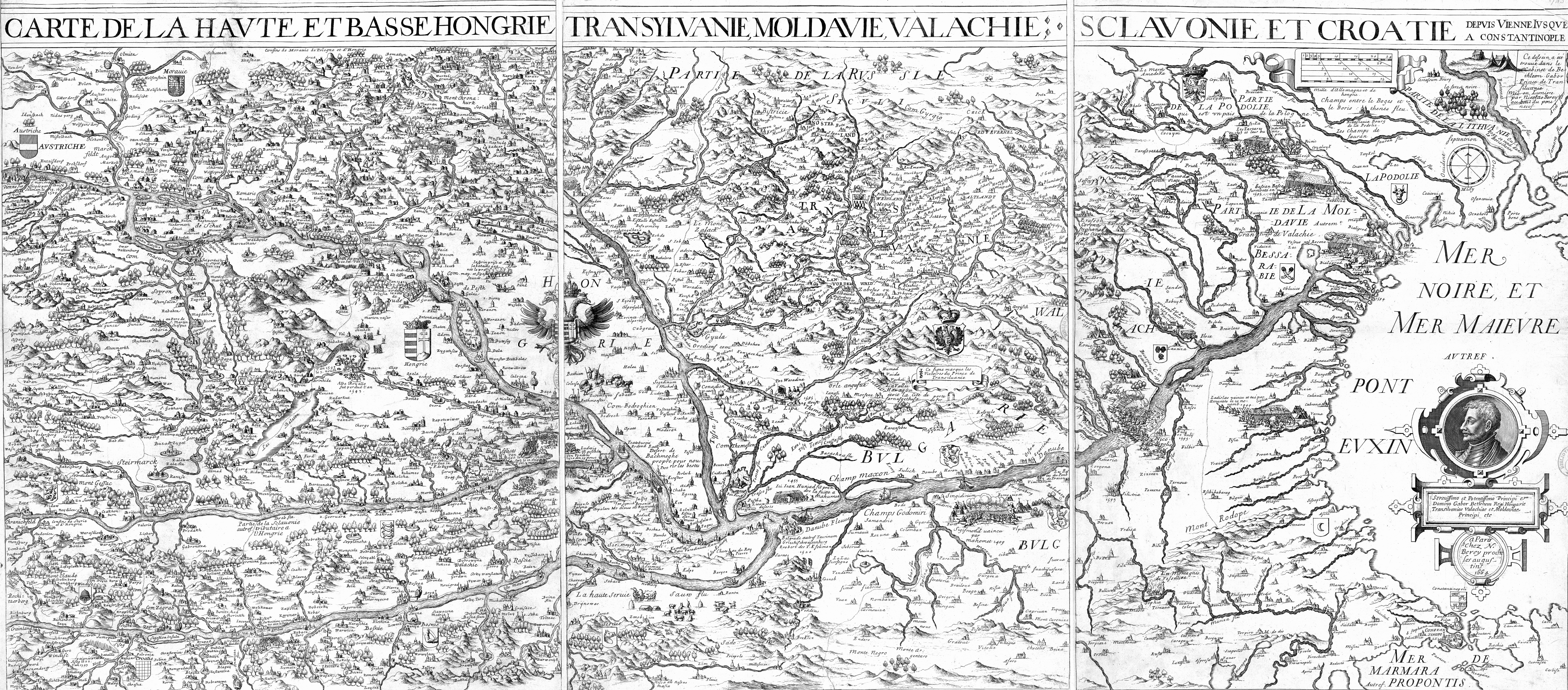 Carte de la haute et basse Hongrie, Transylvanie, Moldavie, Valachie Sclavonie et Croatie... dessein... trouvé dans le cabinet de Bethleem Gabor, prince de Transilvanie..